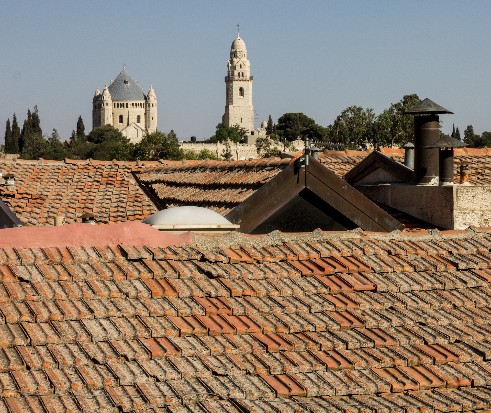 כנסיית הדורמציון מבעד לגגות ימין משה